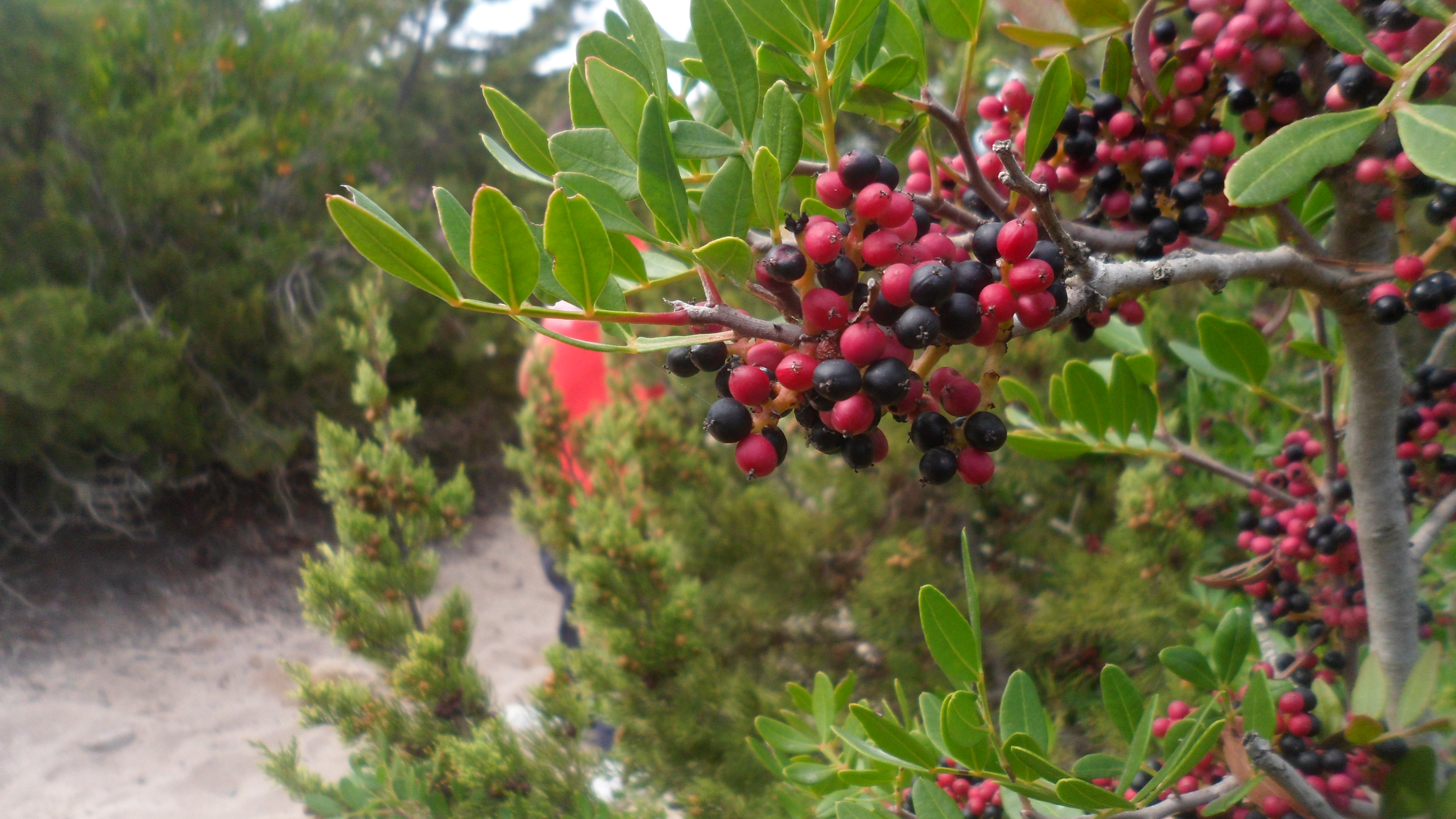 Imatge presa entre Son Serra i Son Real.